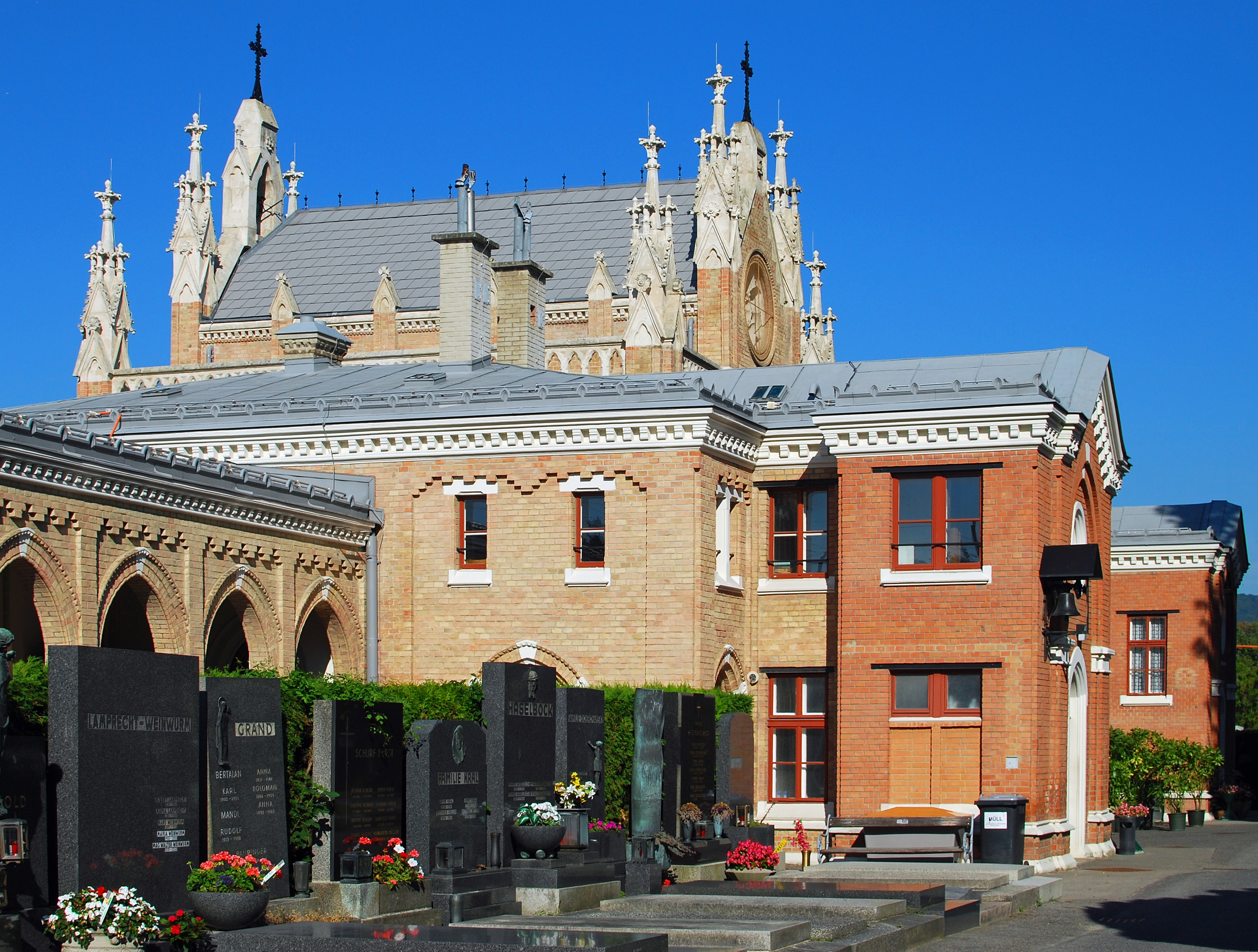 Aufbahrungshalle und das Verwaltungsgebäude